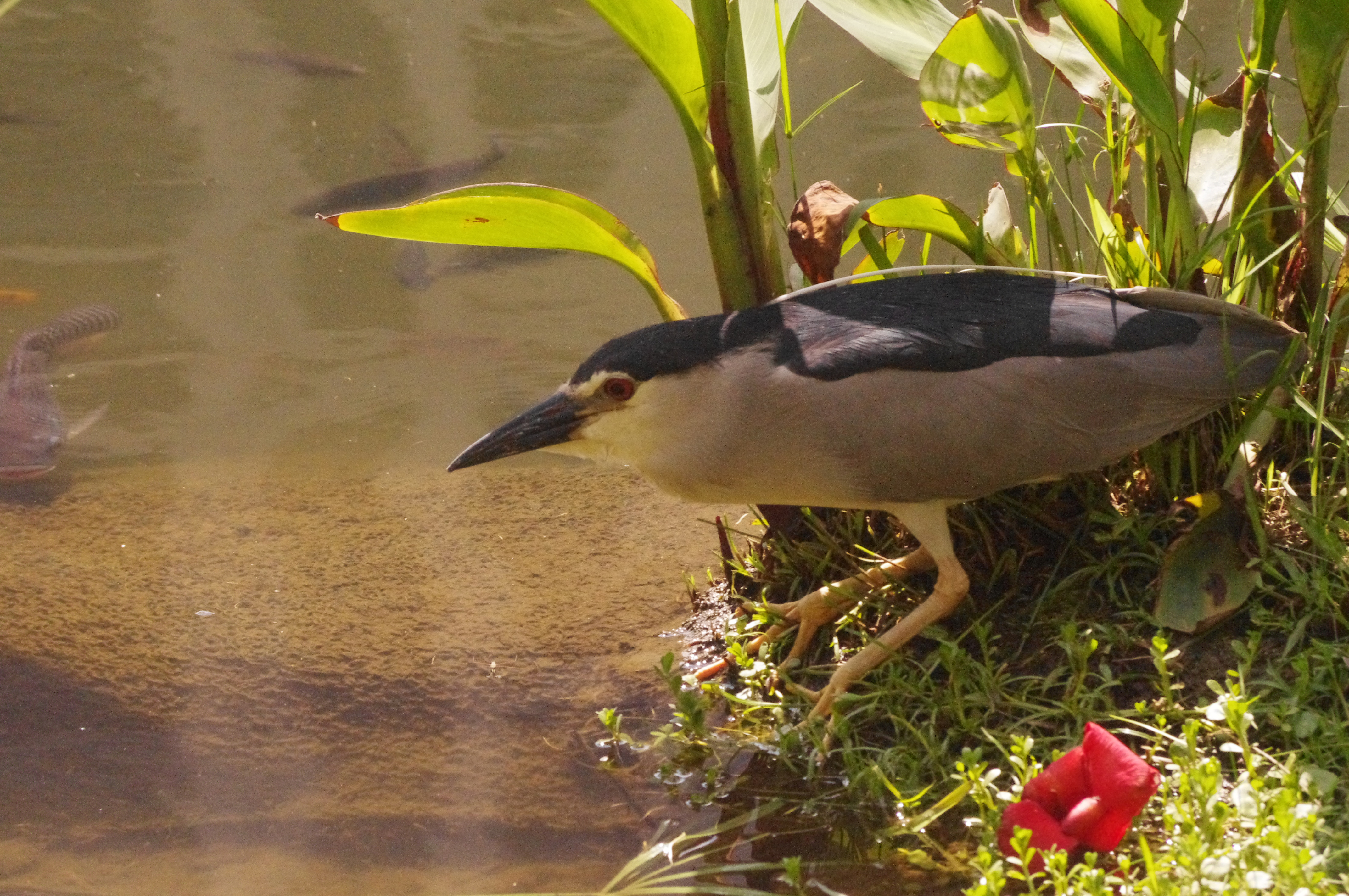 一隻於水邊覓食的夜鷺